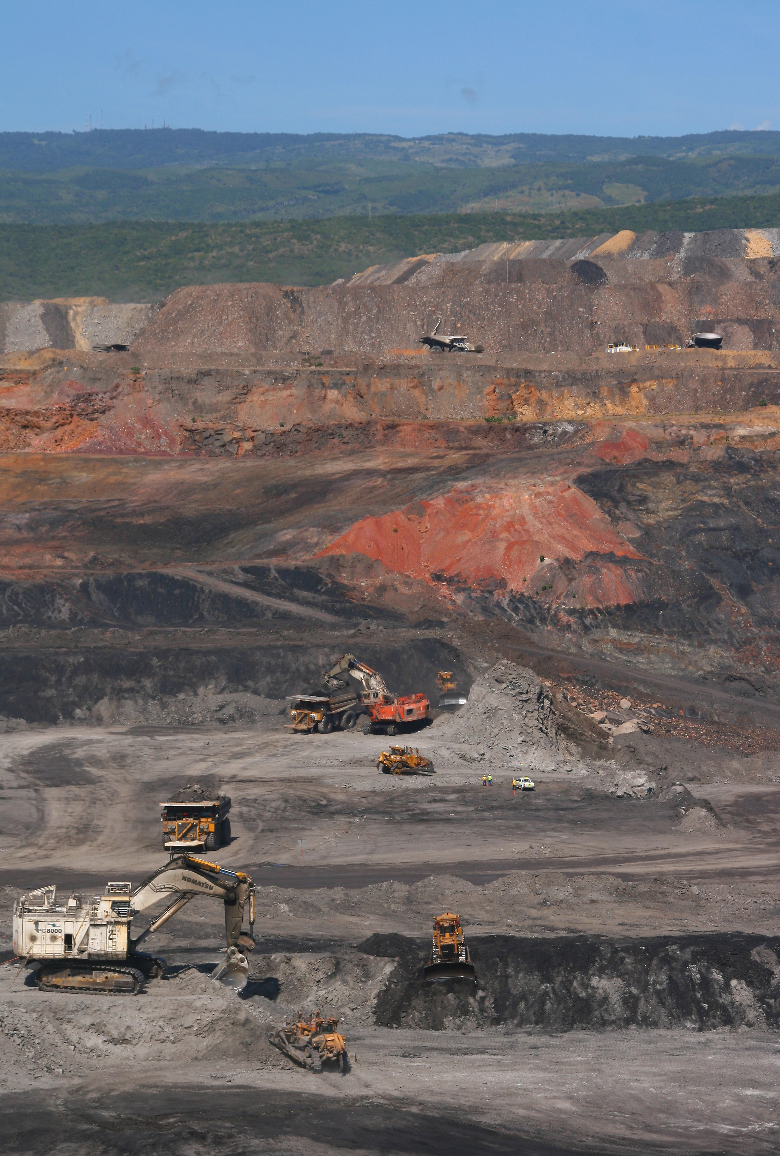 Coal mine, El Cerrejón